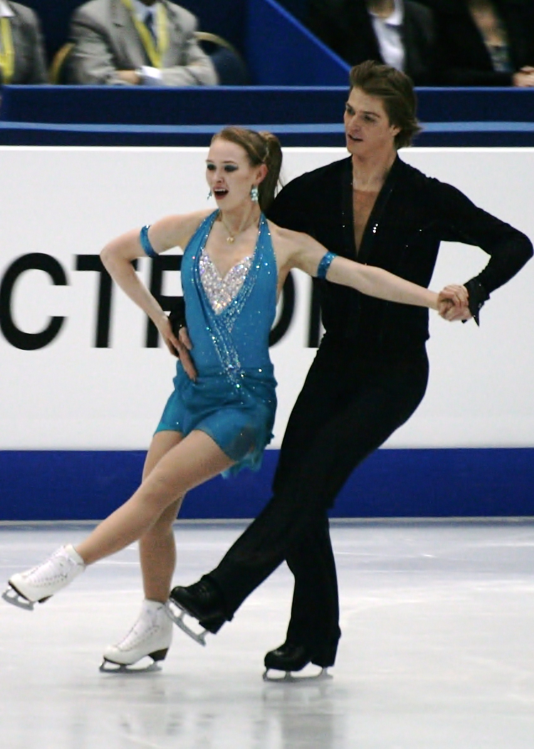 Шивон Хикин-Кенеди и Дмитрий Дунь (Украина) на чемпионате мира по фигурному катанию 2012